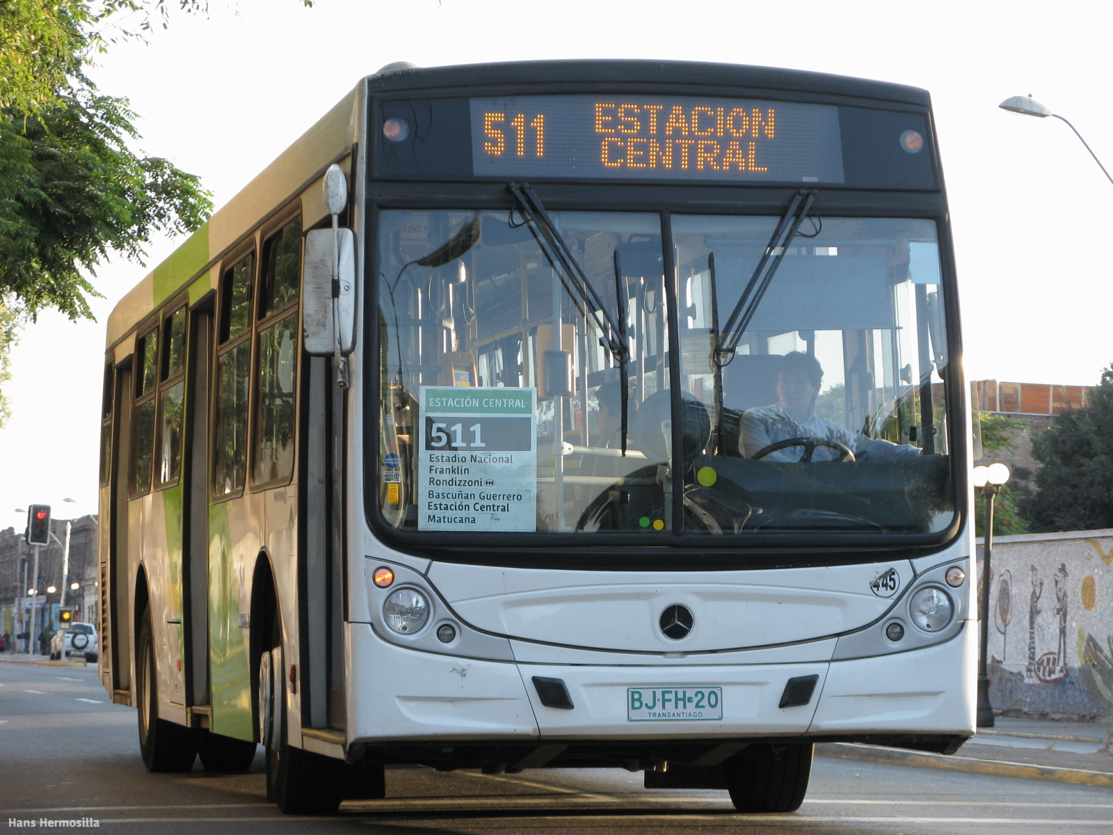 Bus que realiza el Troncal 511